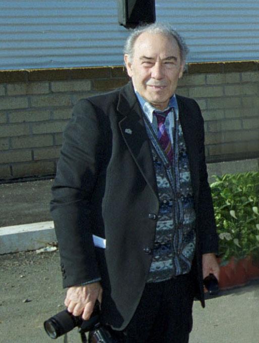 Carlo Riccardi